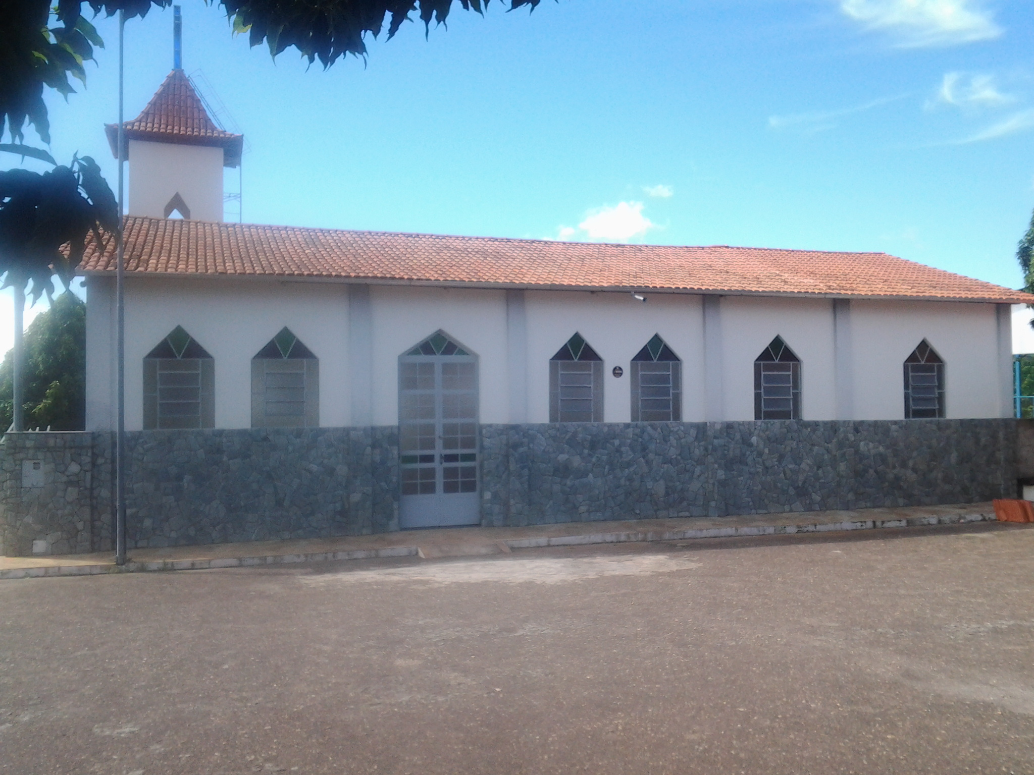 Vista lateral da Capela de São Sebastião em Gouveia-MG